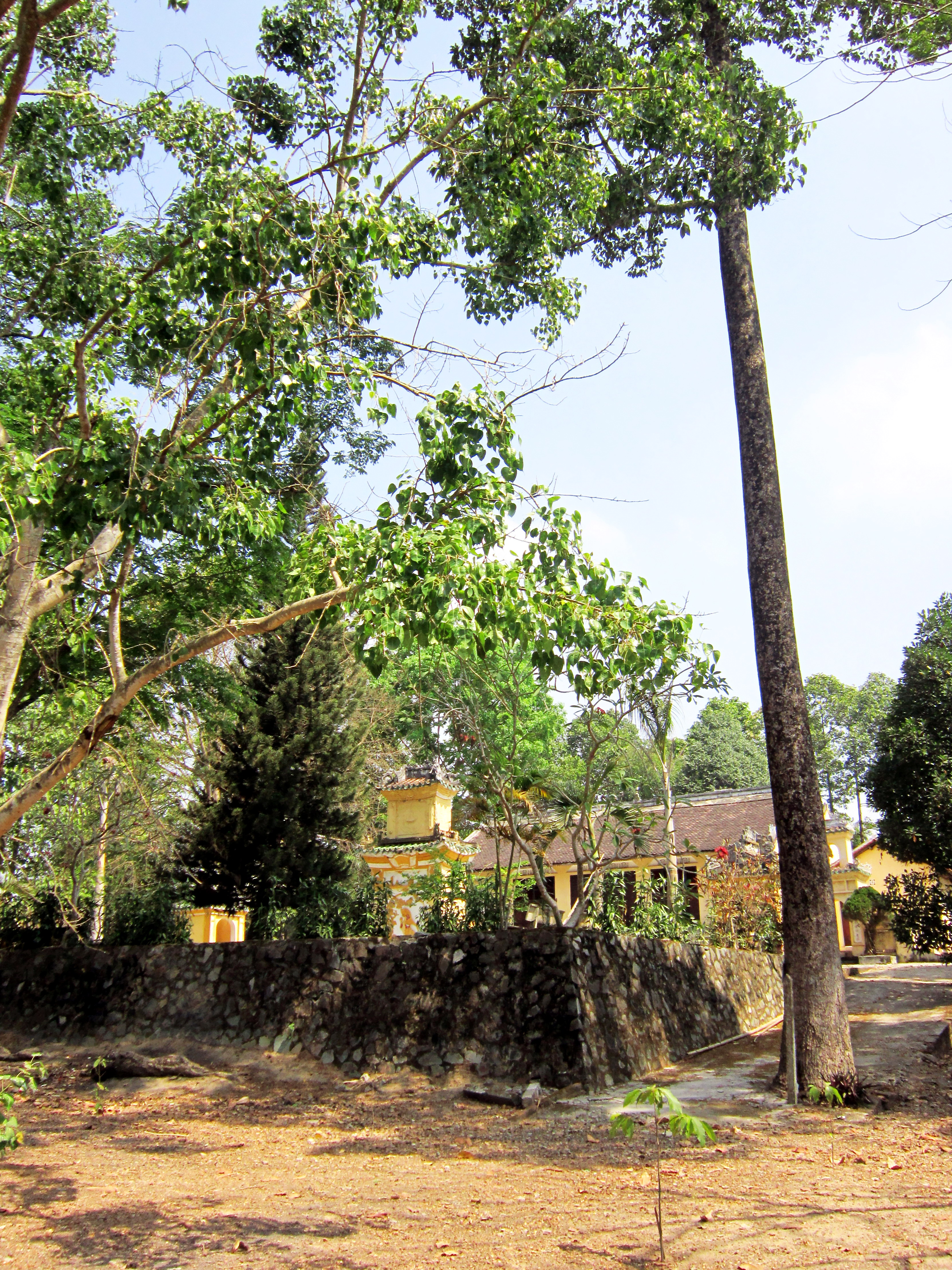 Toàn cảnh đình Phú Cường ở TP. Thủ Dầu Một, tỉnh Bình Dương, Việt Nam.